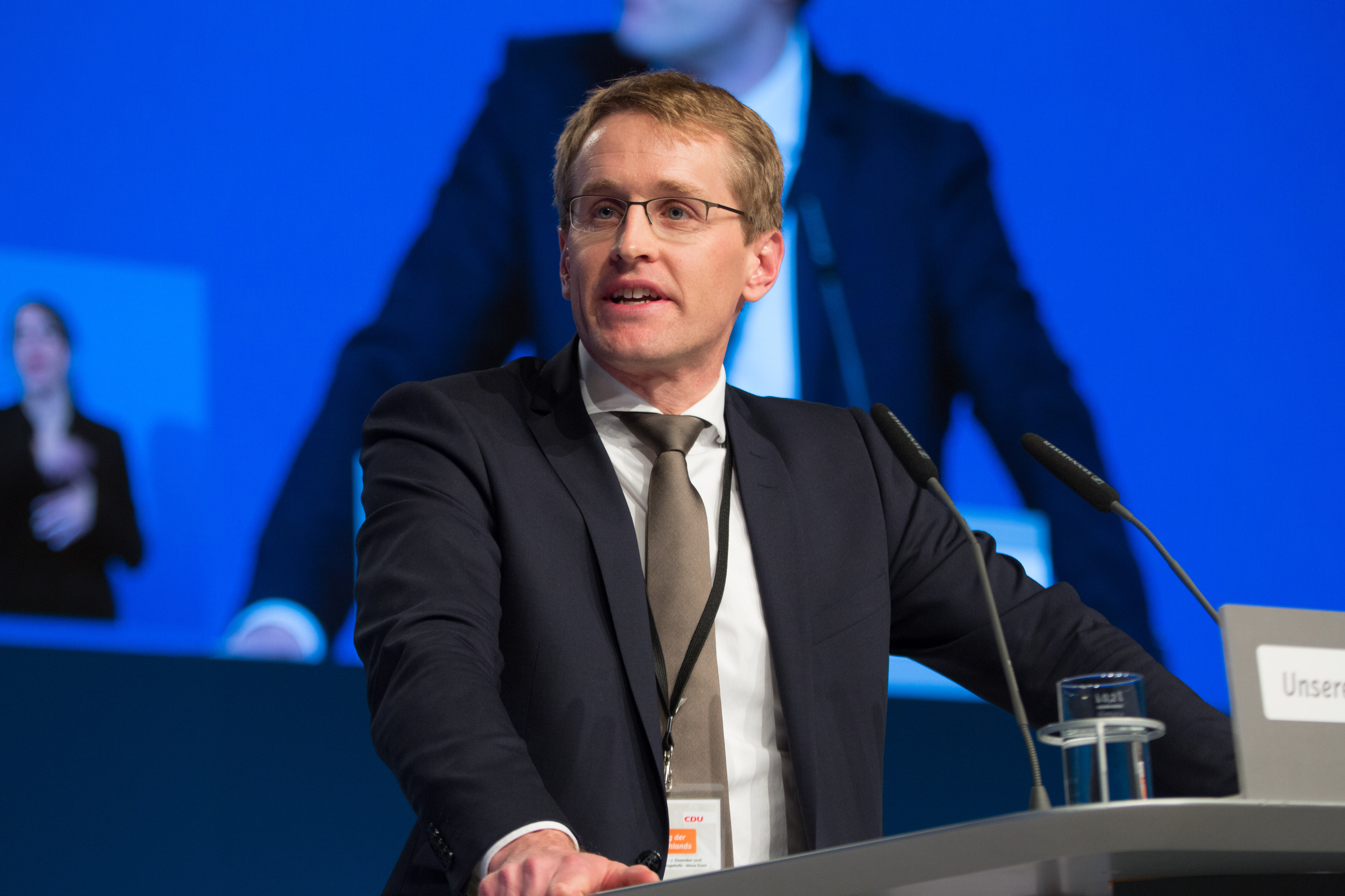 Daniel Günther, Vorsitzender der CDU Landtagsfraktion SchleswigHolstein auf dem 29. Parteitag der CDU Deutschlands am 6. Dezember 2016 in Essen, Grugahalle